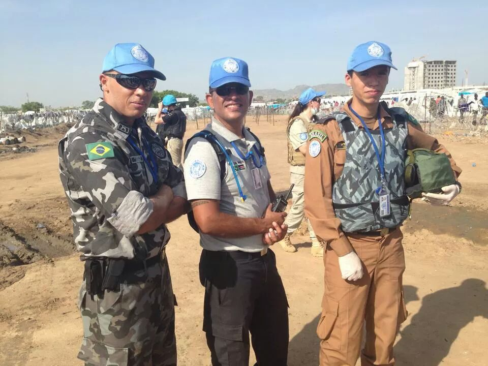 Tenente PMPR Pakuszewski, Subtenente PMDF Da Mata e Tenente PMPR Kravetz durante operação de busca e apreensão em campo de refugiados